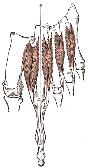 Interossei dorsales, left foot